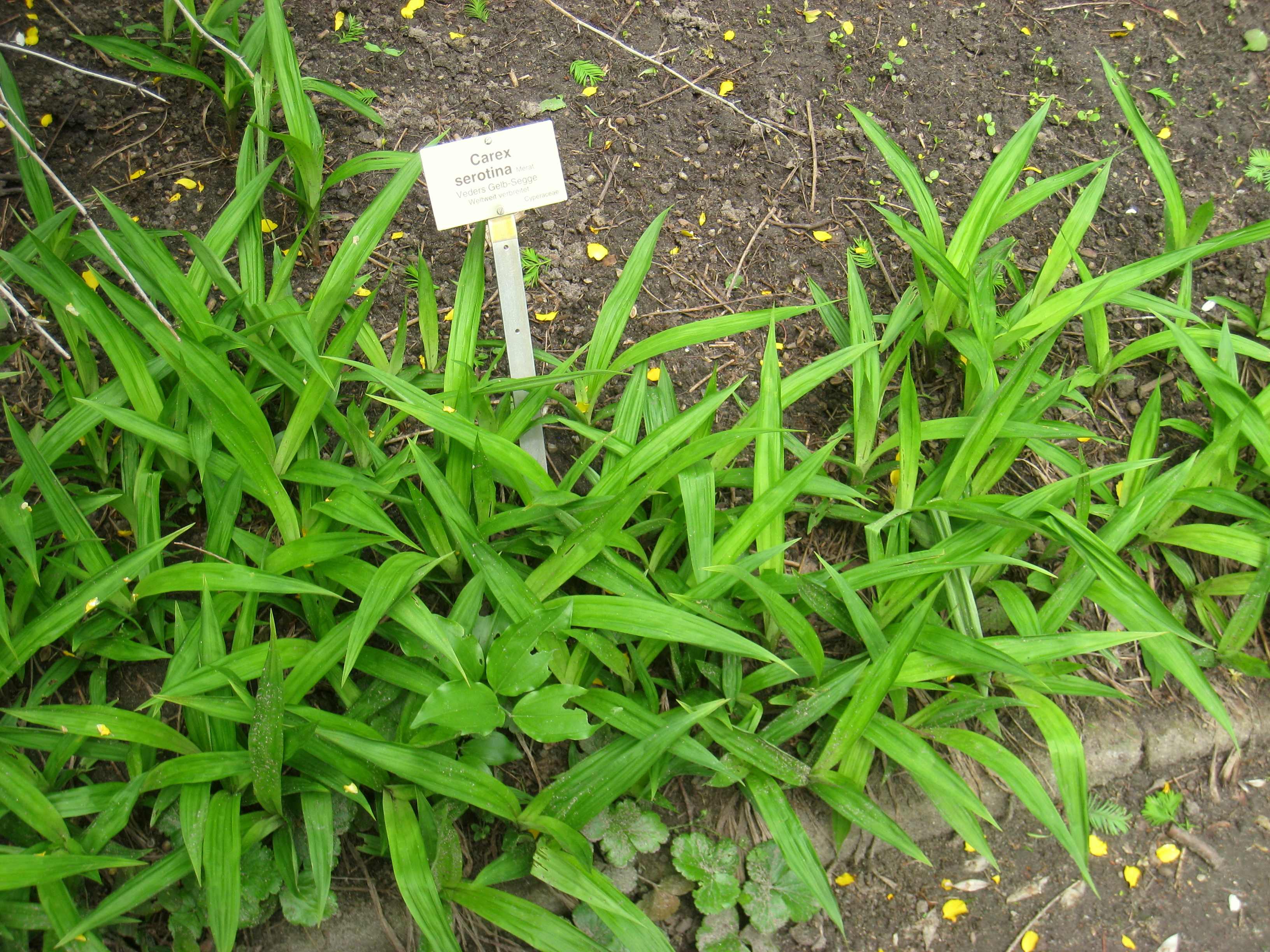 Carex serotina specimen in the Botanischer Garten, Berlin-Dahlem (Berlin Botanical Garden), Berlin, Germany.